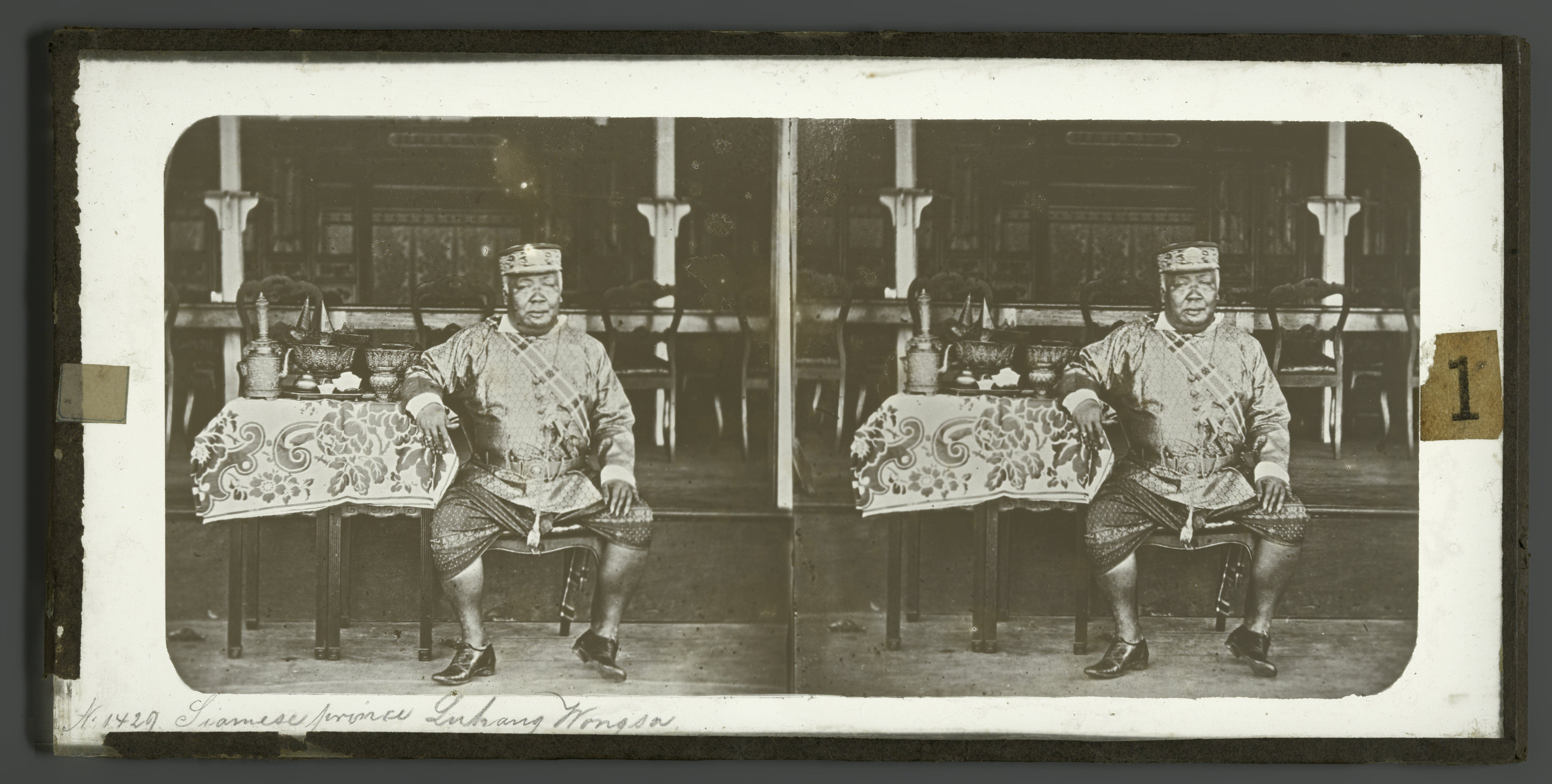 IdentificatieTitel(s): Siamese prince Luhang Wongsa [onz]Objecttype: stereofoto Objectnummer: RP-F-F08499VervaardigingVervaardiger: fotograaf: Pierre Joseph RossierPlaats vervaardiging: ThailandDatering: 1861Fysieke kenmerken: stereoglasdiaMateriaal: glas Techniek: fotografieAfmetingen: secundaire drager: h 75 mm × b 150 mmVerwerving en rechtenVerwerving: overdracht van beheer 1994Copyright: Publiek domein